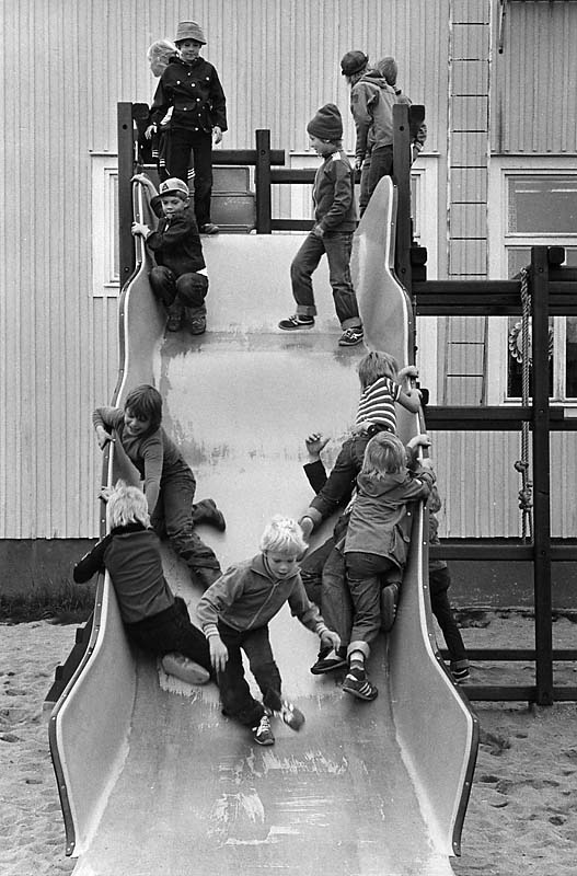 Skolbarn på skolgården.; Byggnadsverk; Skola; Utbildning och vetenskap